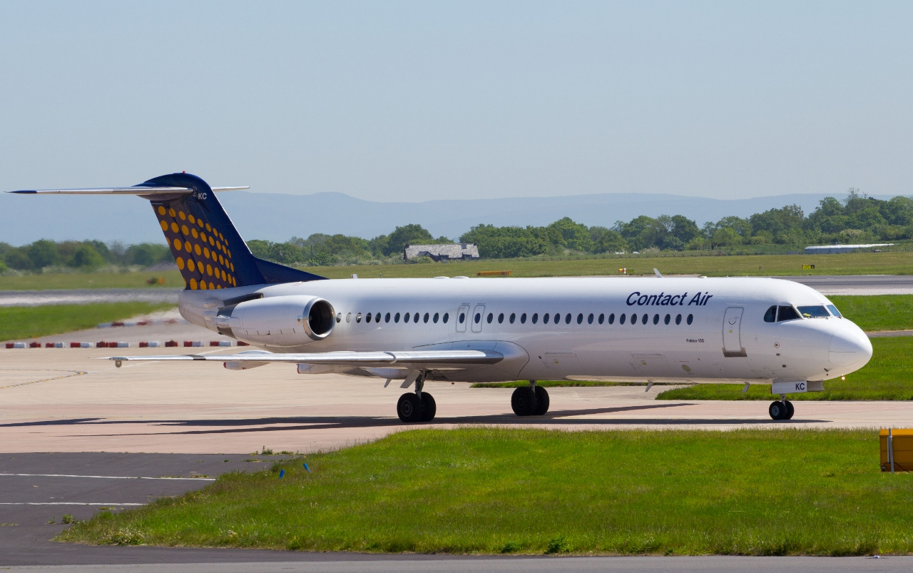 Manchester 25/5/12